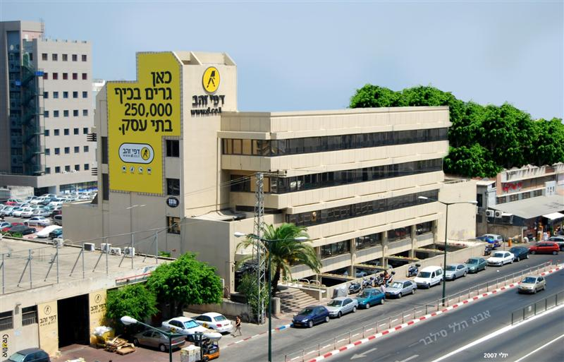 Golden Pages Building in Ramat Gan, Israel